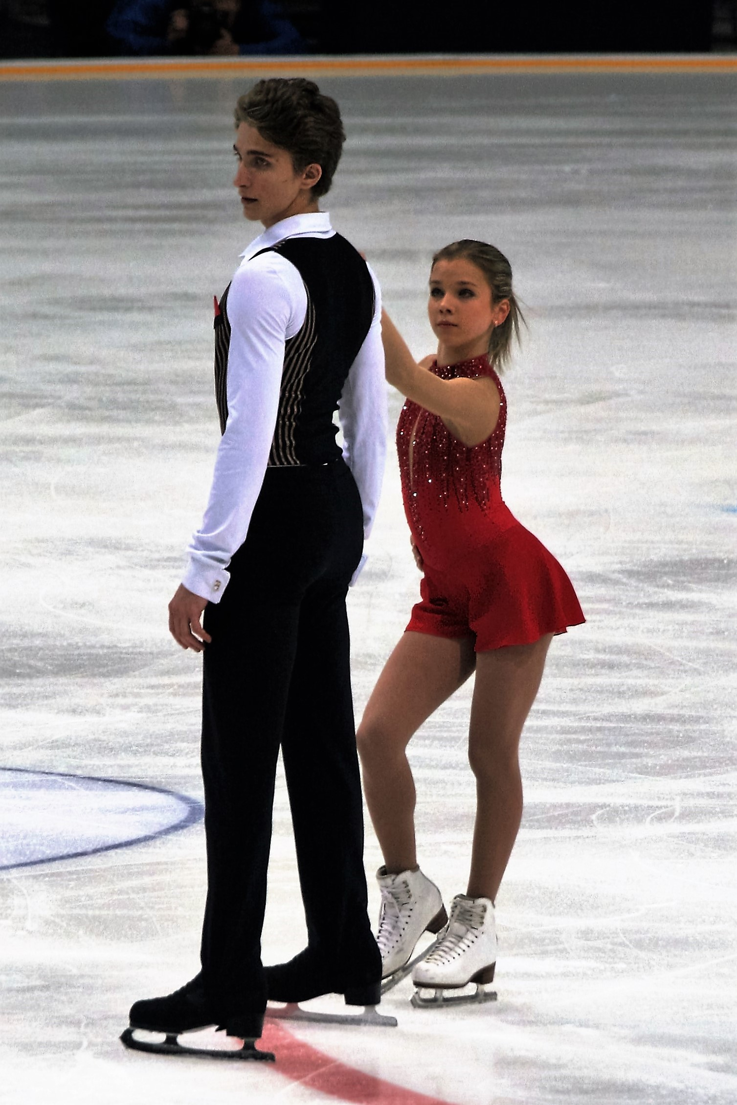 Алиса Ефимова / Александр Коровин на Кубке Ростелекома 2016.